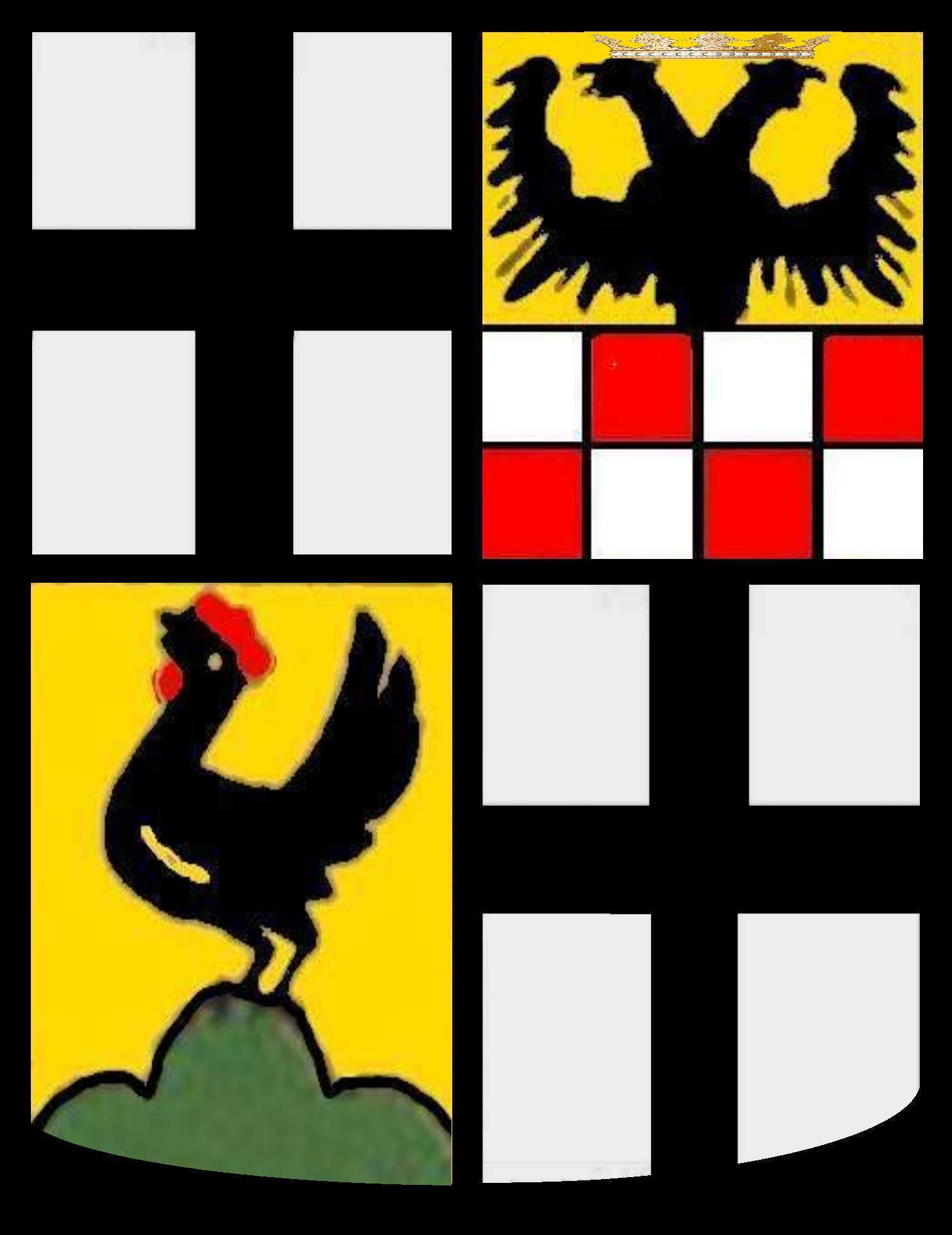 Wappen Johann III. Graf von Henneberg-Schleusingen, Fürstabt von Fulda 1521/29–1541